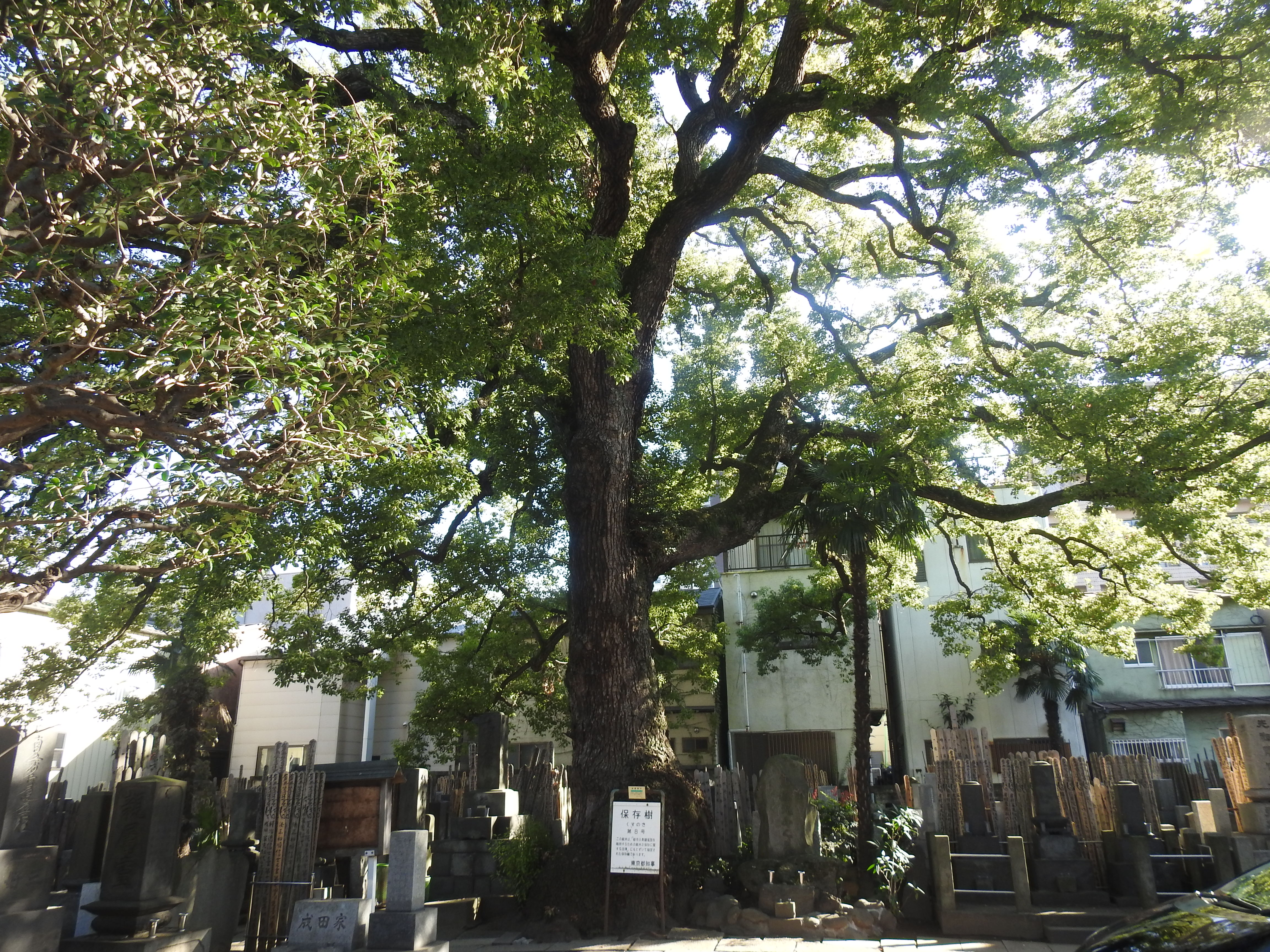 大雄寺境内にあるクスノキ（東京都保存樹第8号）を2018年11月17日に撮影したもの。